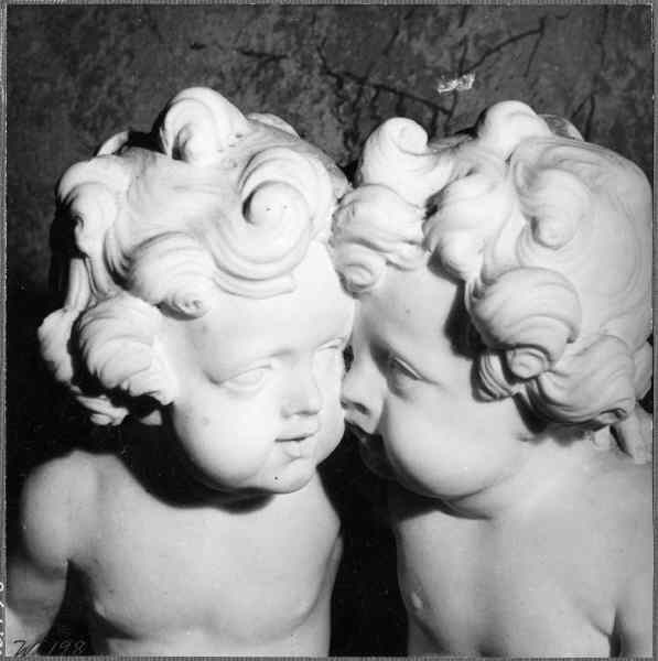 Gravmonument över riksrådet Knut Kurck död 1690. Tillverkat i Antwerpen av flamländske bildhuggaren Nicolaus Millich. Detalj. Kategori: (09) Gravar Gravmonument över riksrådet Knut Kurck död 1690. Tillverkat i Antwerpen av flamländske bildhuggaren Nicolaus Millich. Detalj.